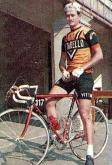 Il ciclista Marino Vigna